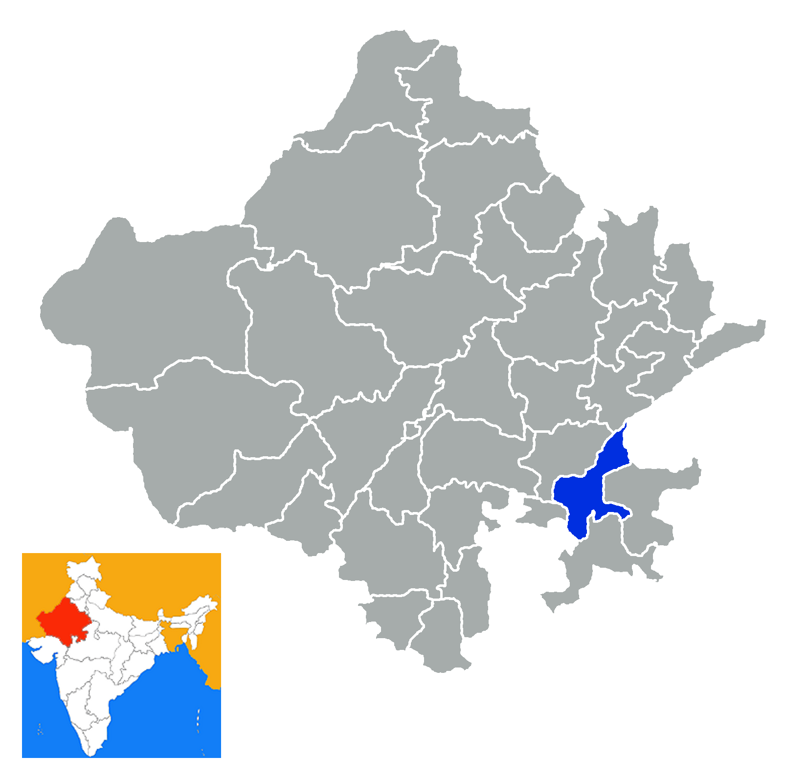 Distrito de Kota Rajastán India